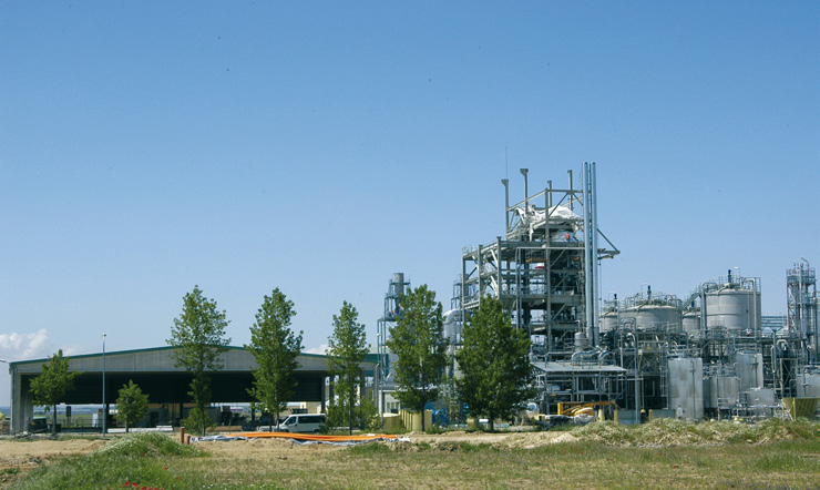 Planta d'etanol a Babilafuente (Salamanca), 12 de maig de 2008.